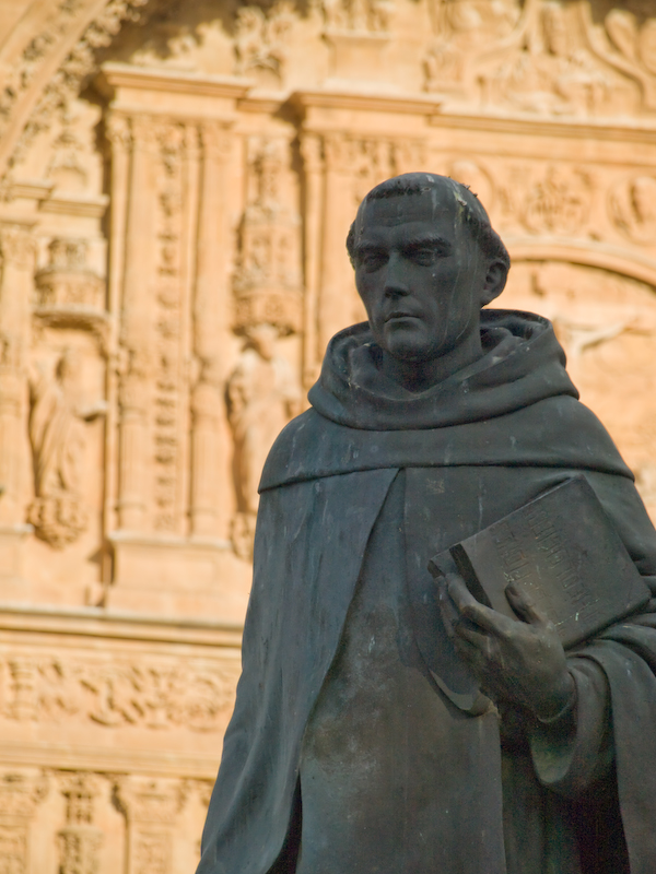 religioso dominico que fuera elegido como primer obispo del Tucumán